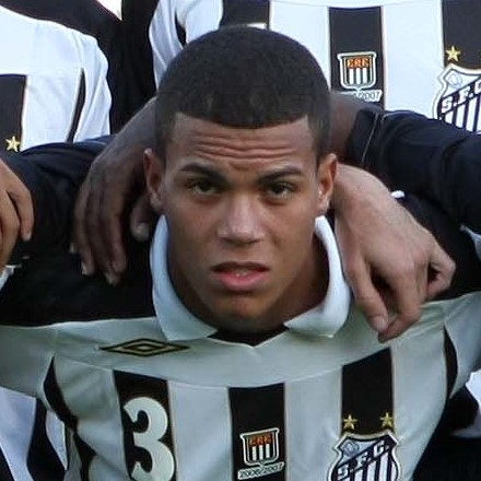 CAMPEONATO PAULISTA 2008 FUTEBOL ESPORTES SETÃOZINHO X SANTOS Time do Santos que iniciou a partida. - ESTÁDIO FREDERICO DALMAZO SERTÃOZINHO/SP BRASIL 01/03/2008 Foto: Junior Faria/GazetaPress código da foto